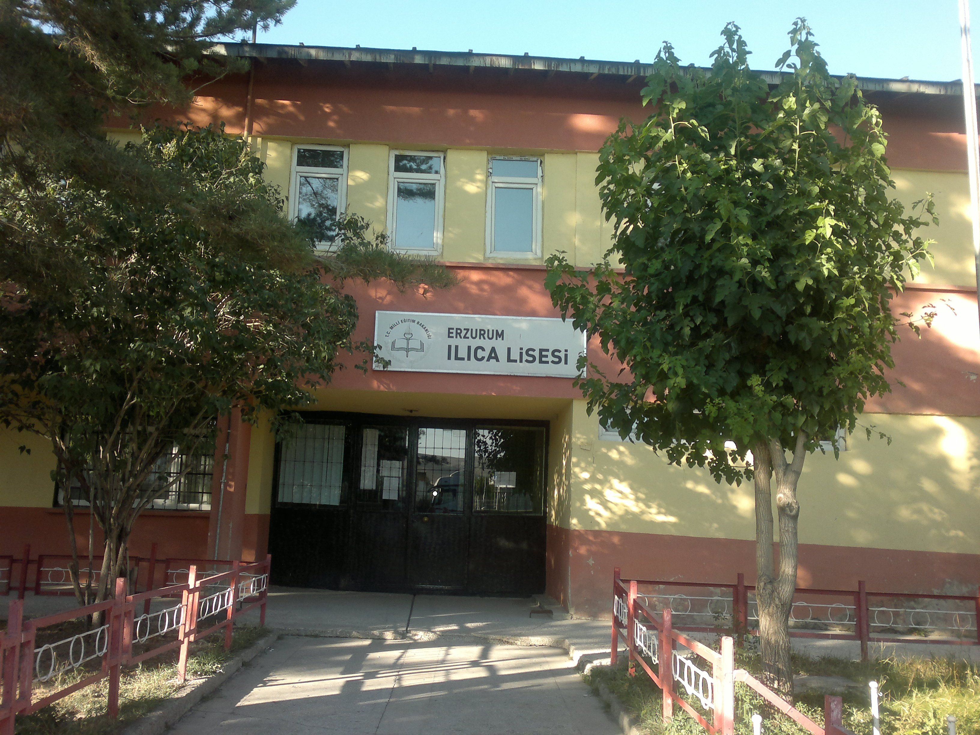 Erzurum Ilıca Lisesi